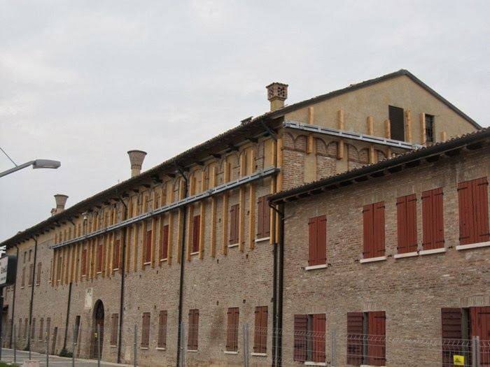 opere municipio